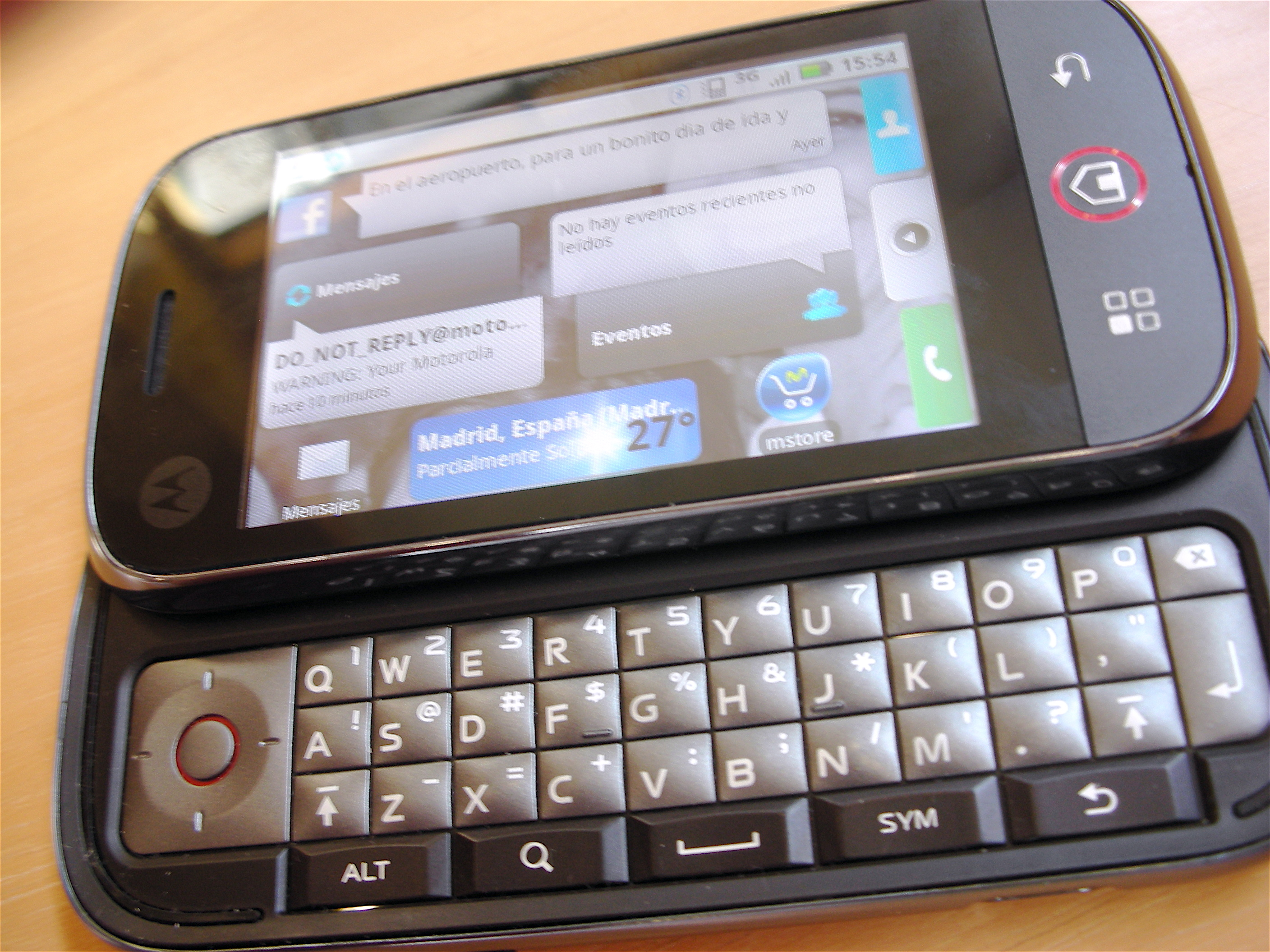 Jugando con el Motorola Dext de �scar Rodr�guez...